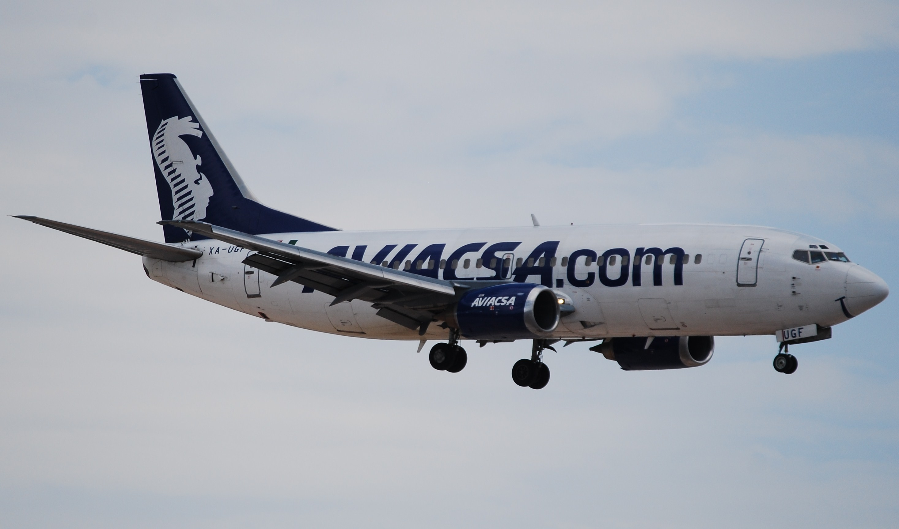 XA-UGF